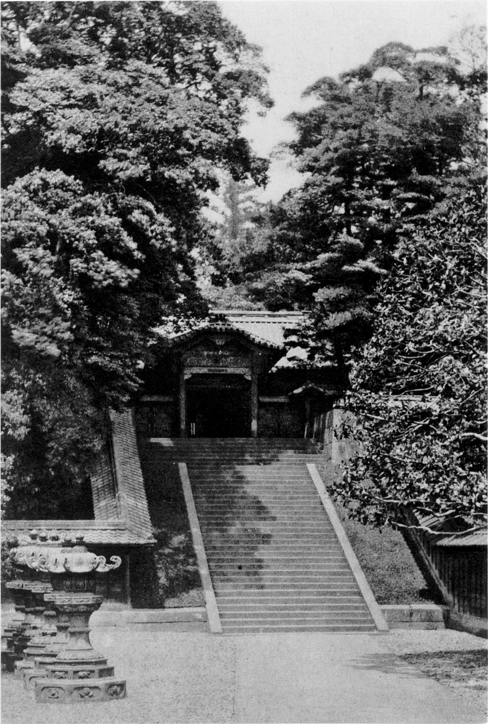 増上寺 文昭院殿 (6代家宣公) 霊廟 奥院唐門 1713年造営、1945年焼失。旧 国宝。